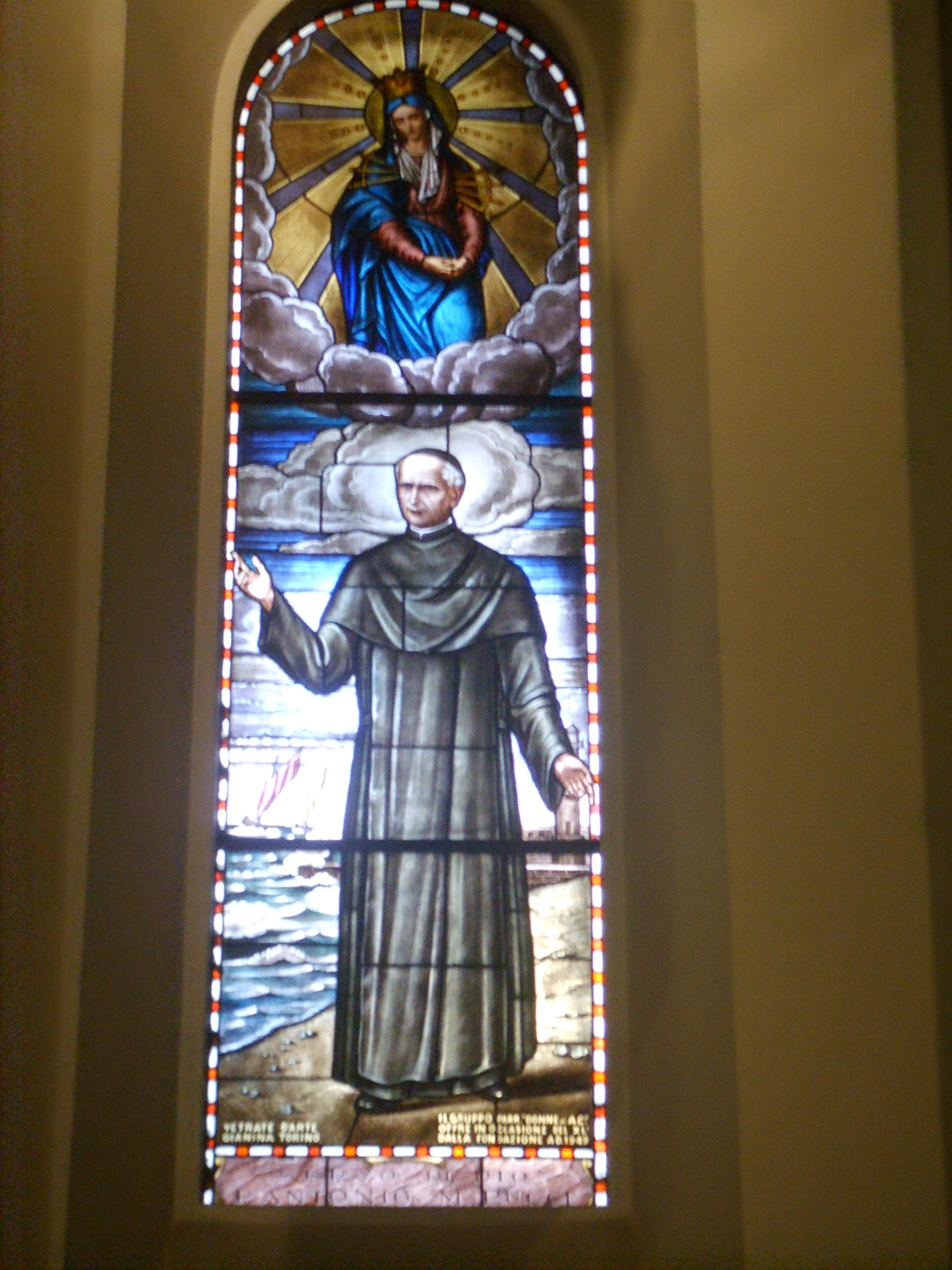 Viareggio, chiesa di sant'andrea, vetrata di sant'antonio maria pucci